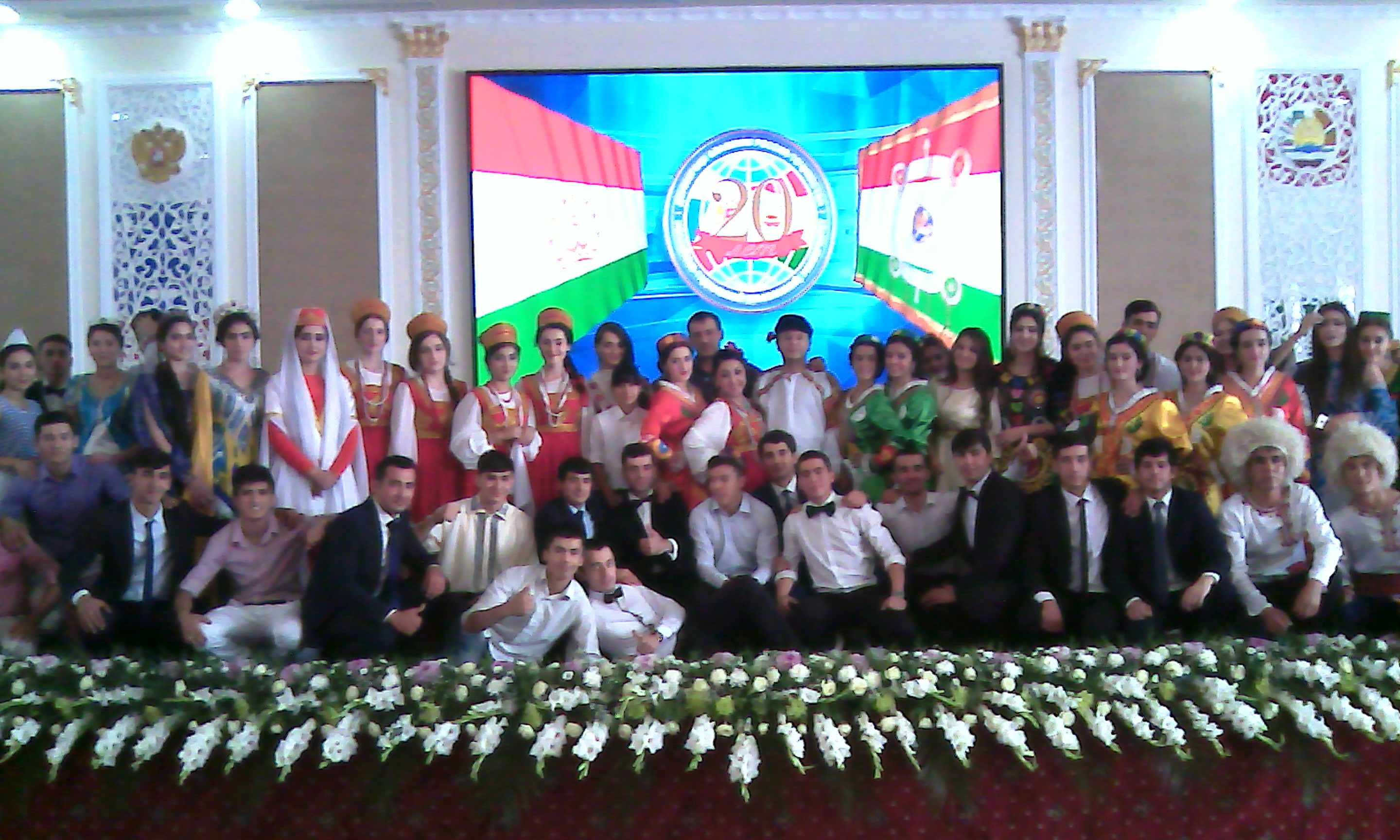 "Славянка" - ансабль студенческого коллектива Российско-таджикского (славянского) университета